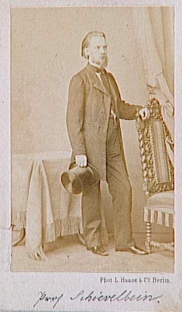 Hermann Schievelbein (1817-1867), deutscher Bildhauer